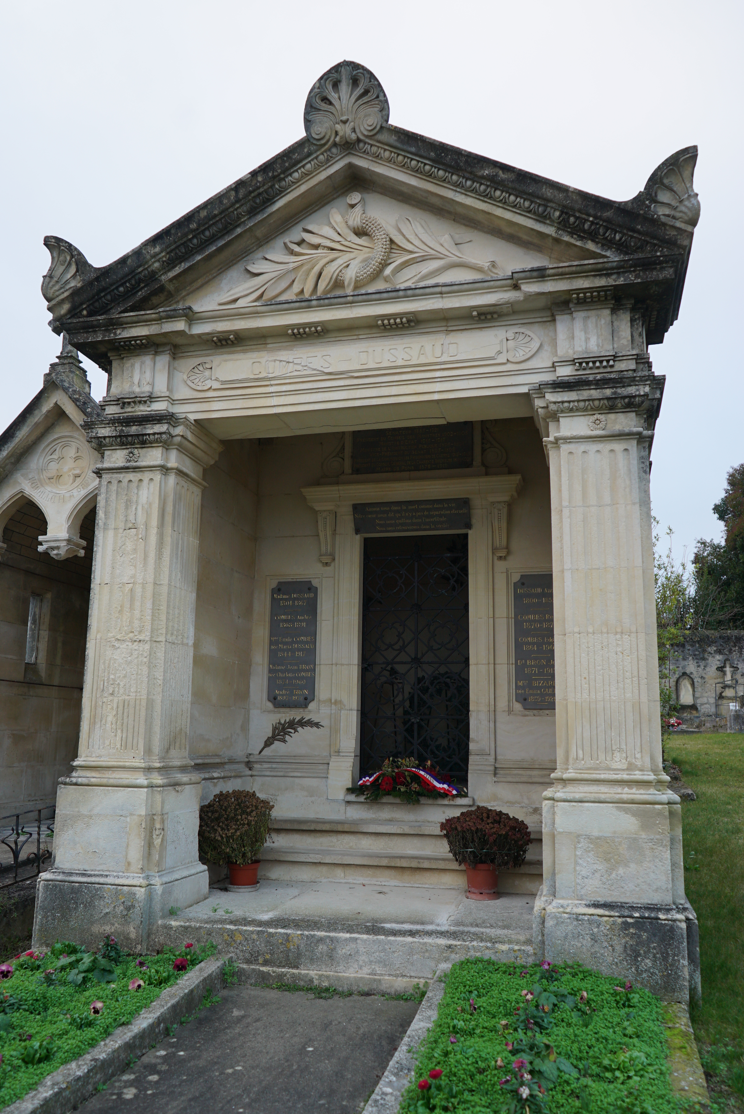 à Pons.